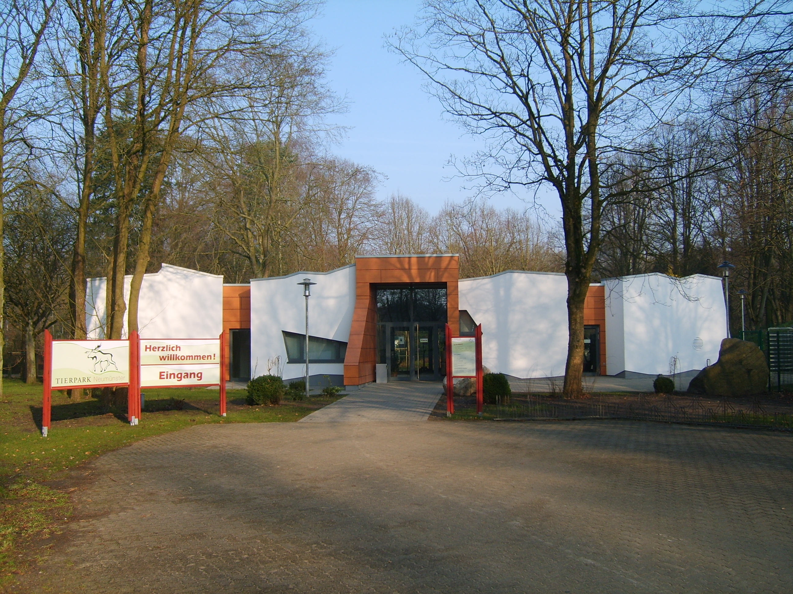 2013 neu errichtetes Eingangsgebäude des Tierparks Neumünster